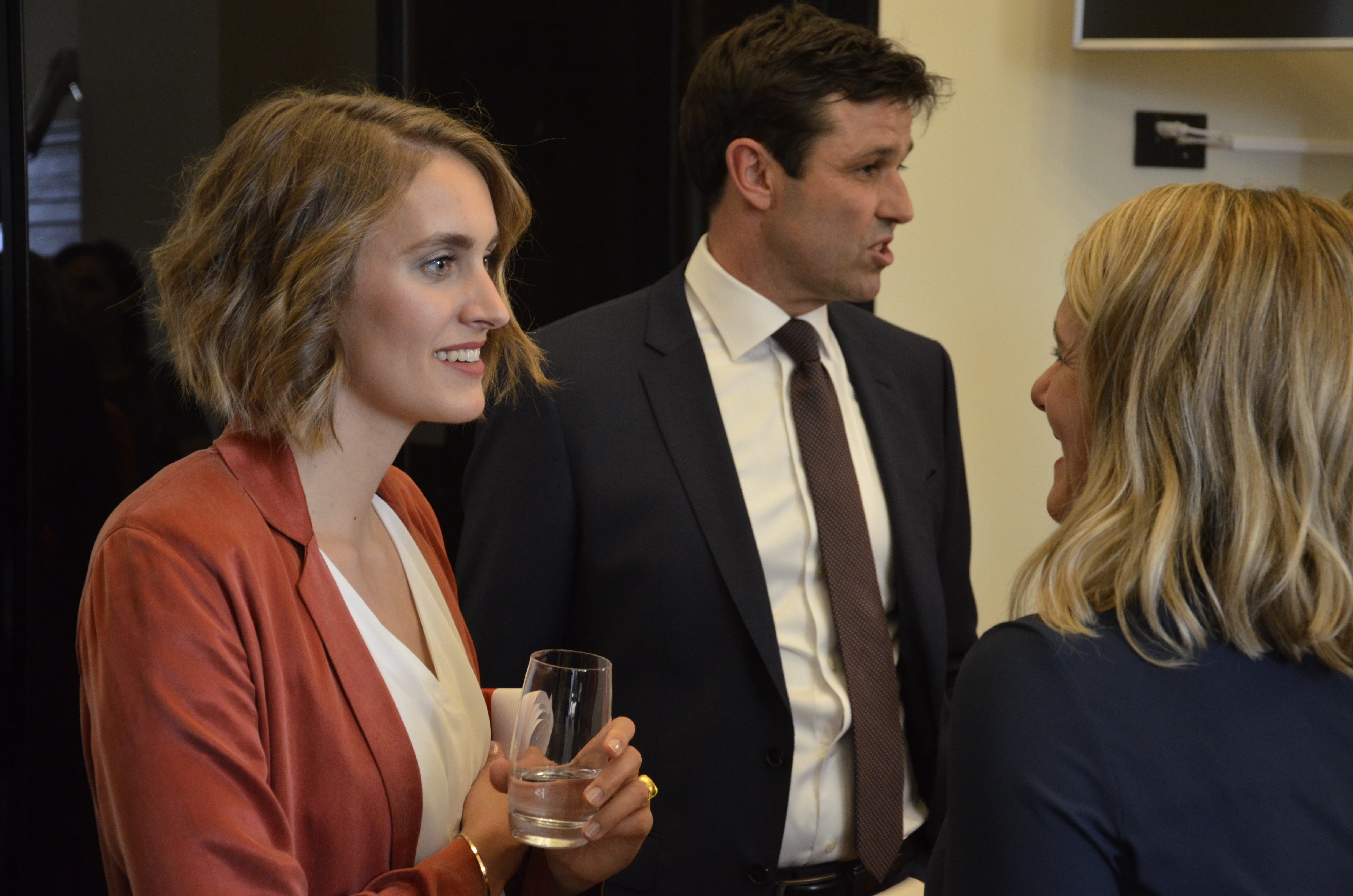 Schweizer Parlamentswahlen 2019: Wahltag im Bundeshaus, Flavia Kleiner (links), Nationalrat Matthias Aebischer, Nationalrätin Kathrin Bertschy